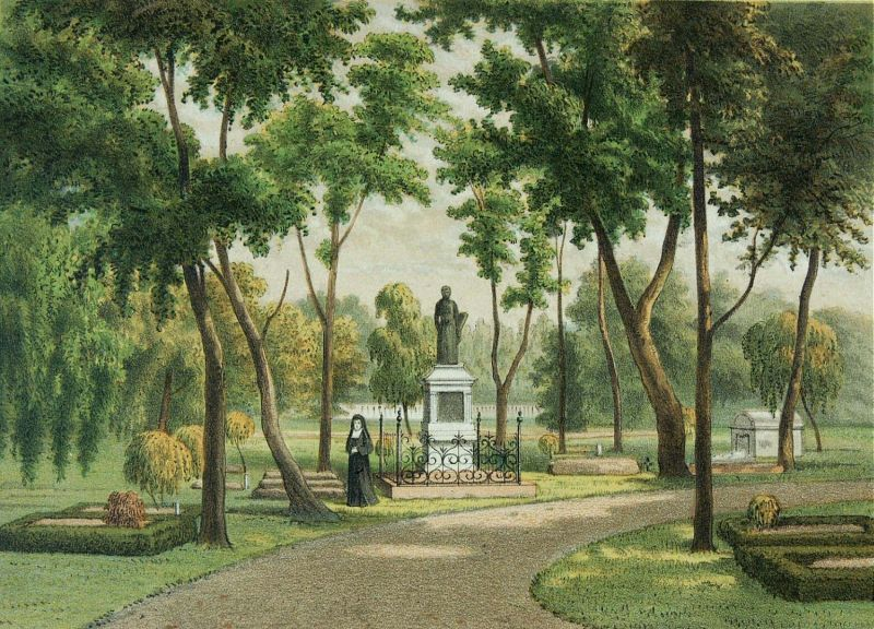 Litho. Kleurenlitho naar een oorspronkelijke aquarel van Rappard.. Het Europese kerkhof in Tanah Abang met het monument voor pastoor Van der Grinten